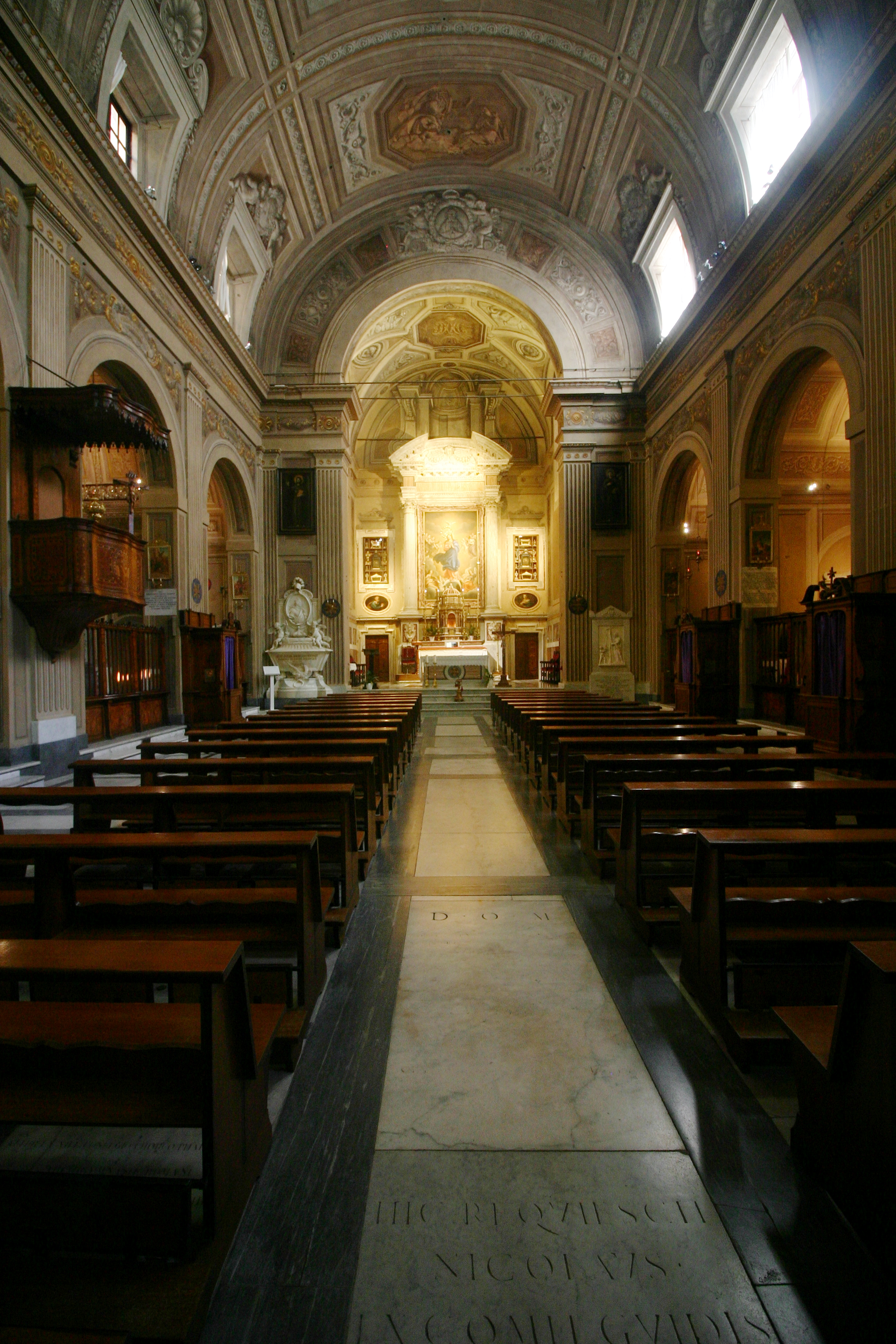 Santa Maria Immacolata a via Veneto - Rome